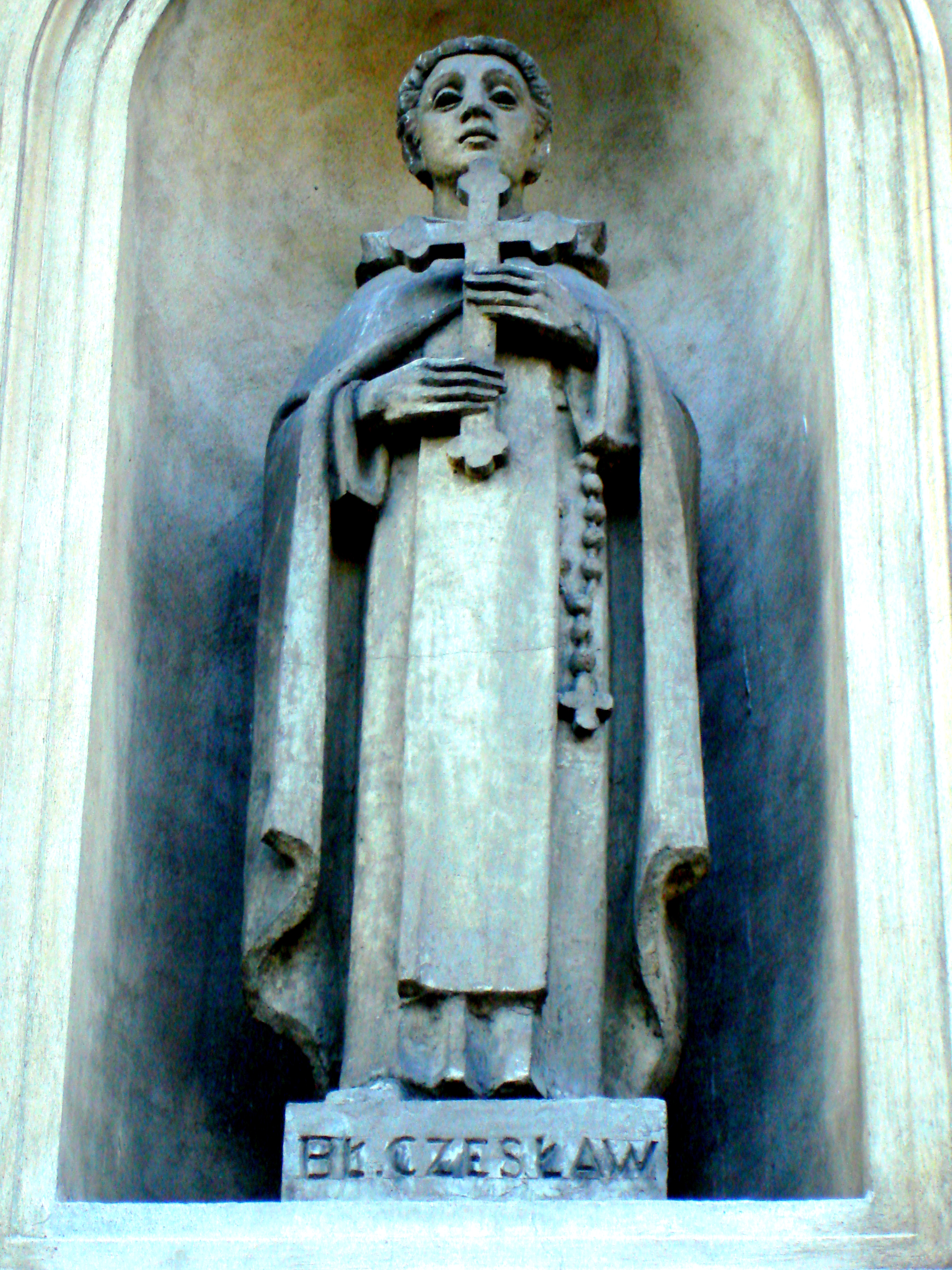 Błogosławiony Czesław na fasadzie kościoła pw. Wszystkich Świętych w Warszawie